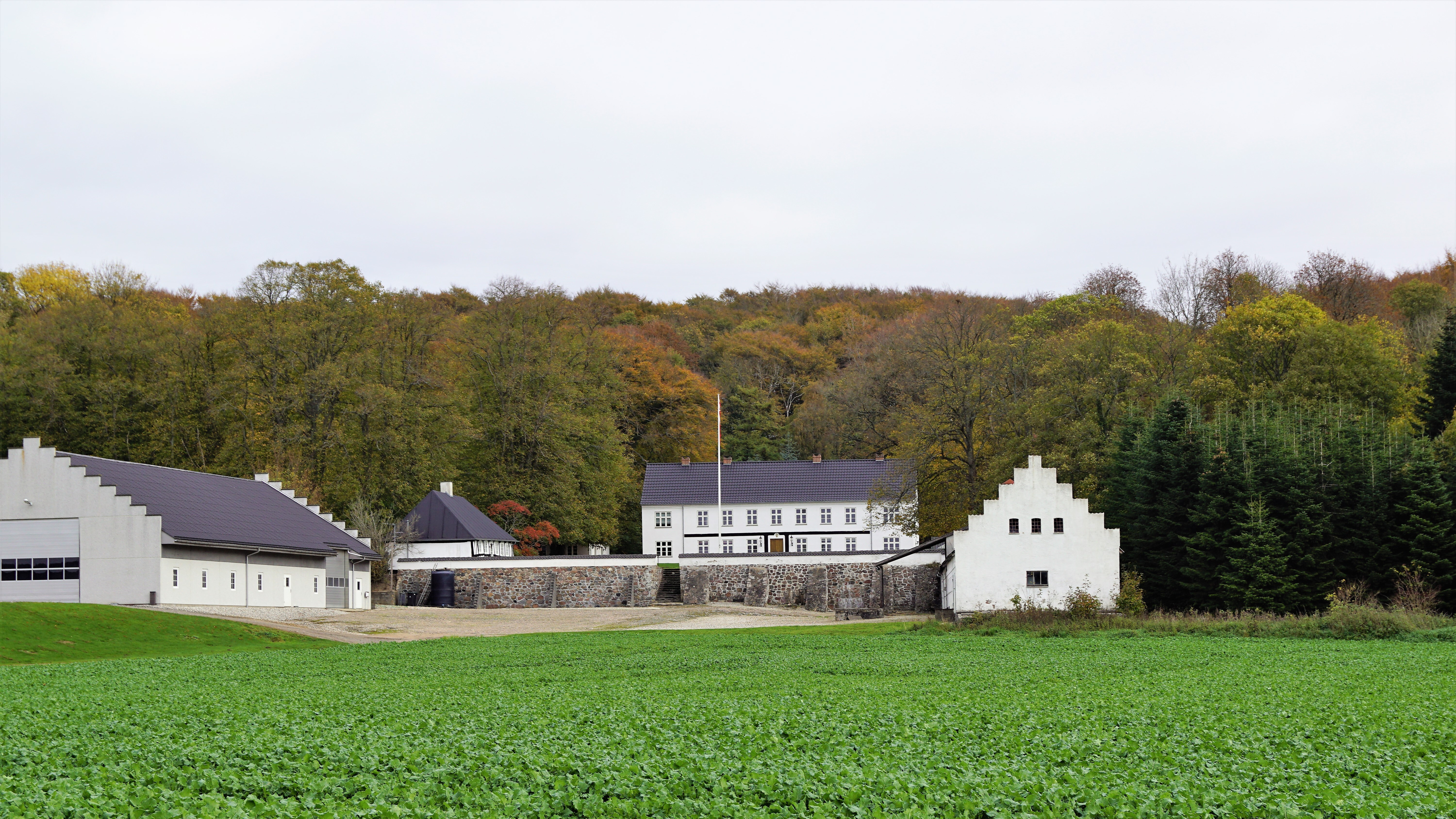 Haraldslund ved Hinnerup 2018, set fra vest